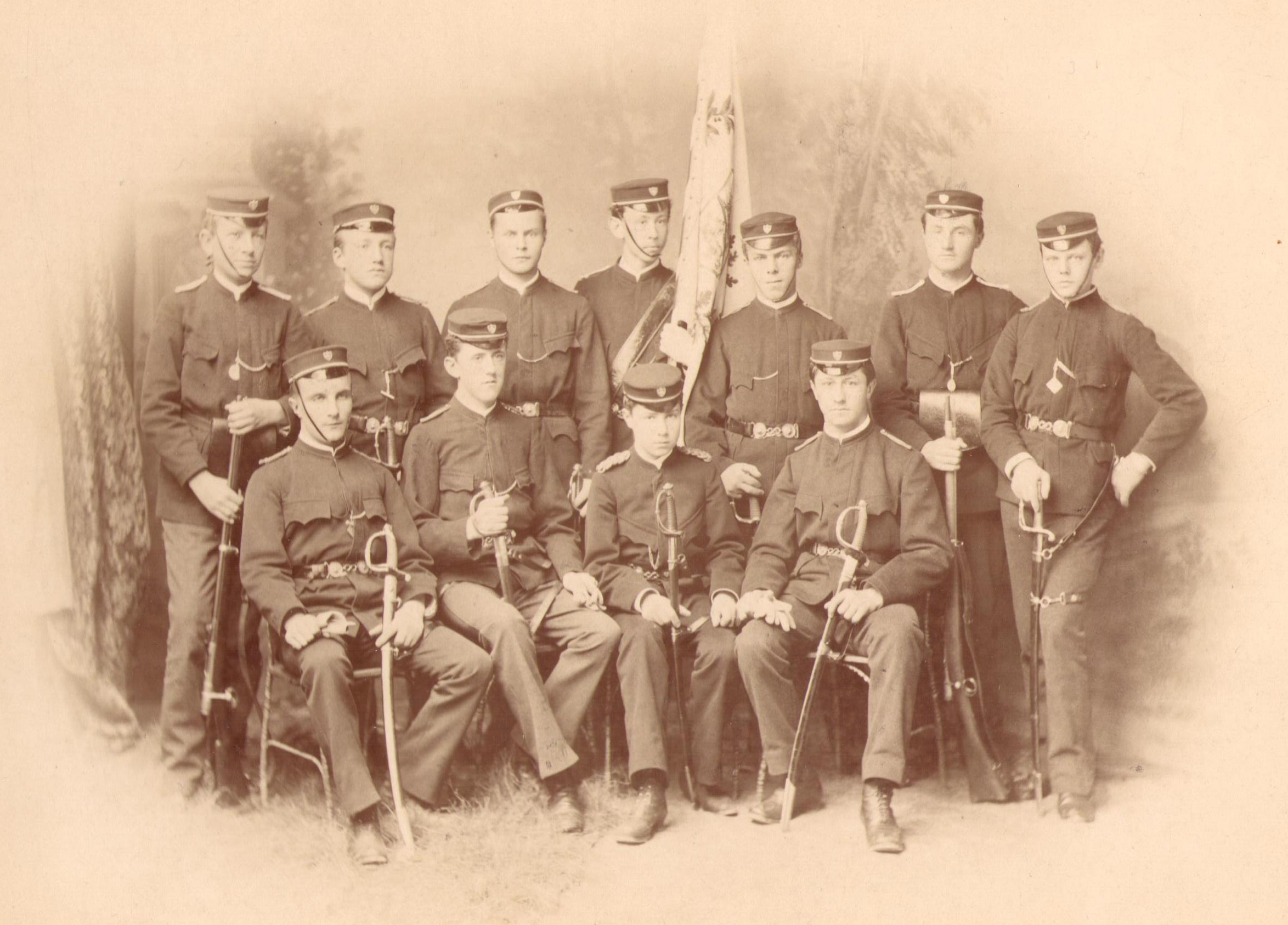 Etat-major des cadets de Winthertur (ZH) en 1885.